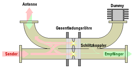 Arbeitsprinzip des Balanced Duplexers